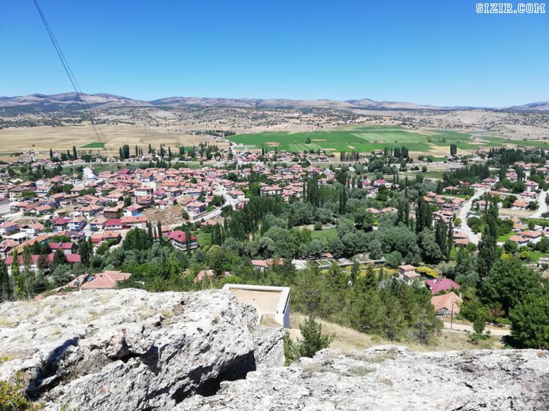 Sızır Kasabası genel görünümü